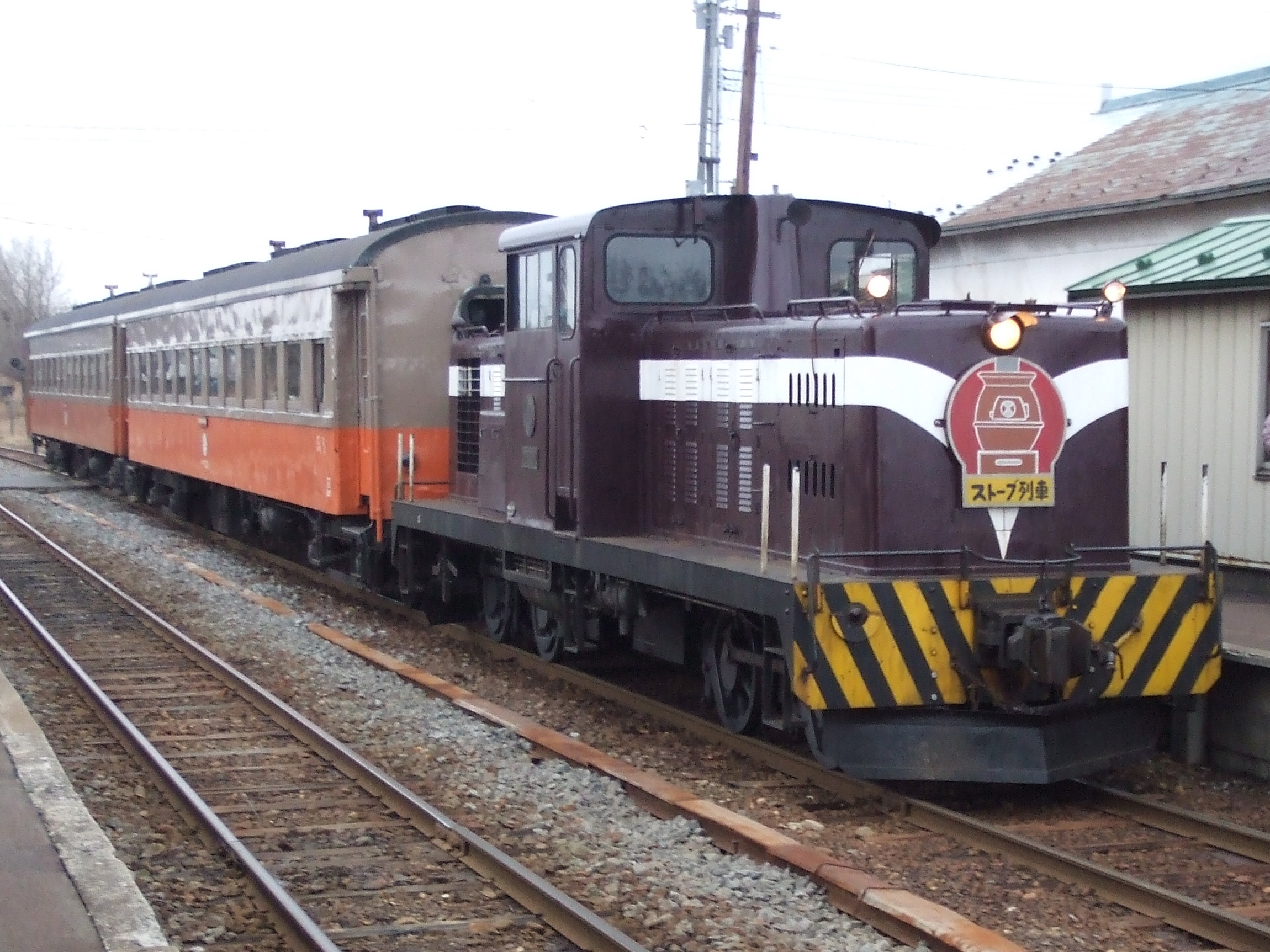 津軽鉄道 ストーブ列車